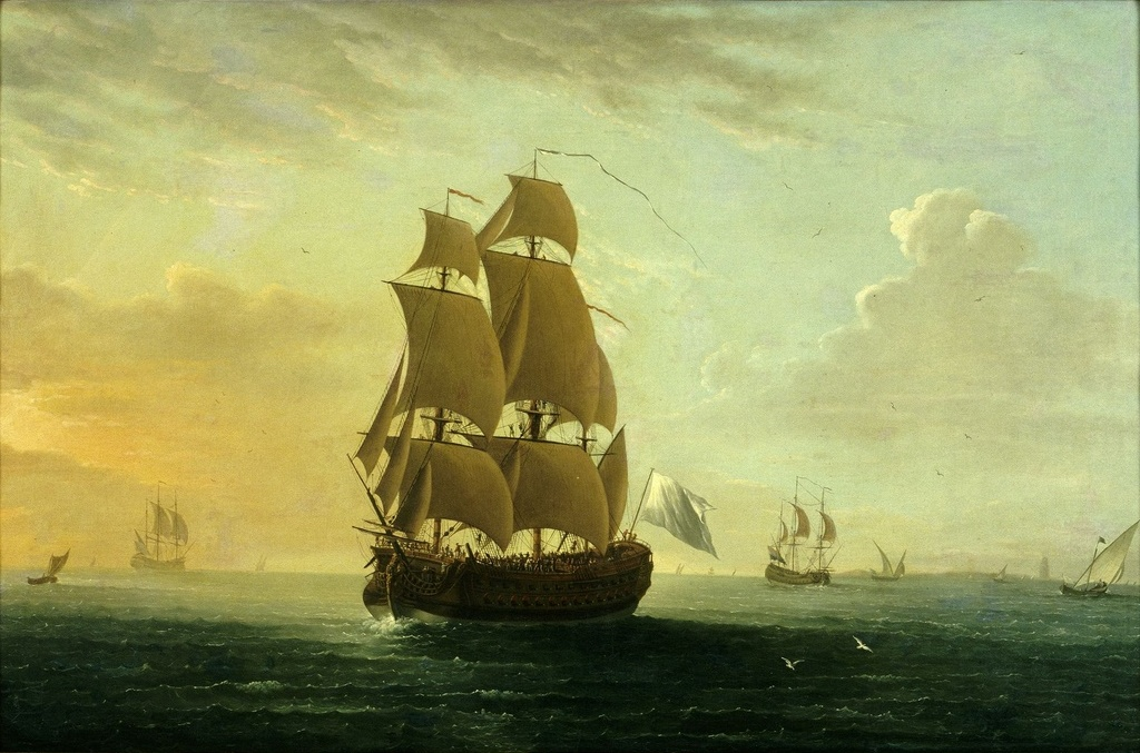 Vaisseau de ligne français à deux ponts. Sans nom ni date précise. Peut-être vers 1750-1770, car ressemblant à un vaisseau type de 64 canons.